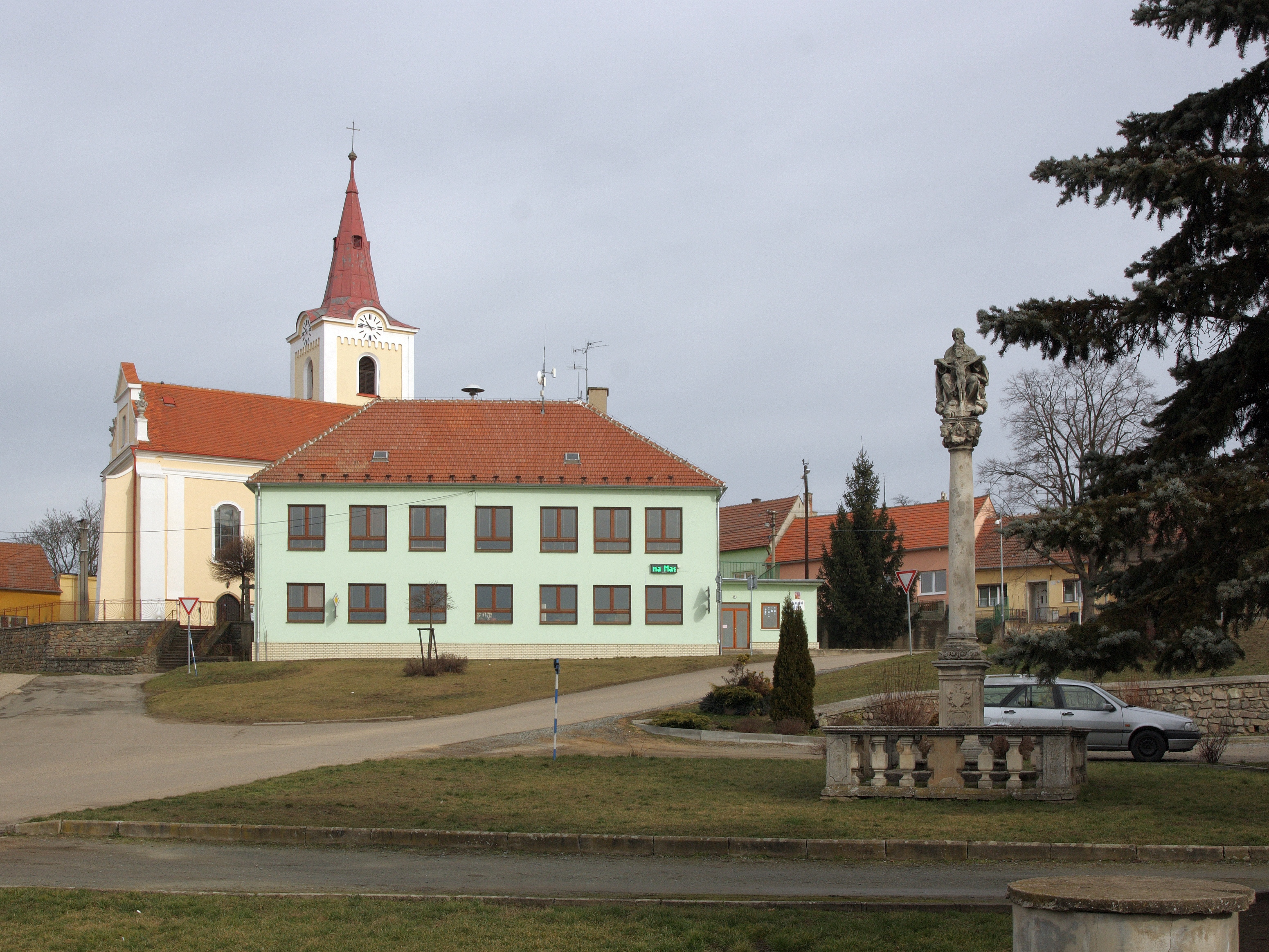 Medlov - náves se školou, kostelem a sloupem svaté Trojice.